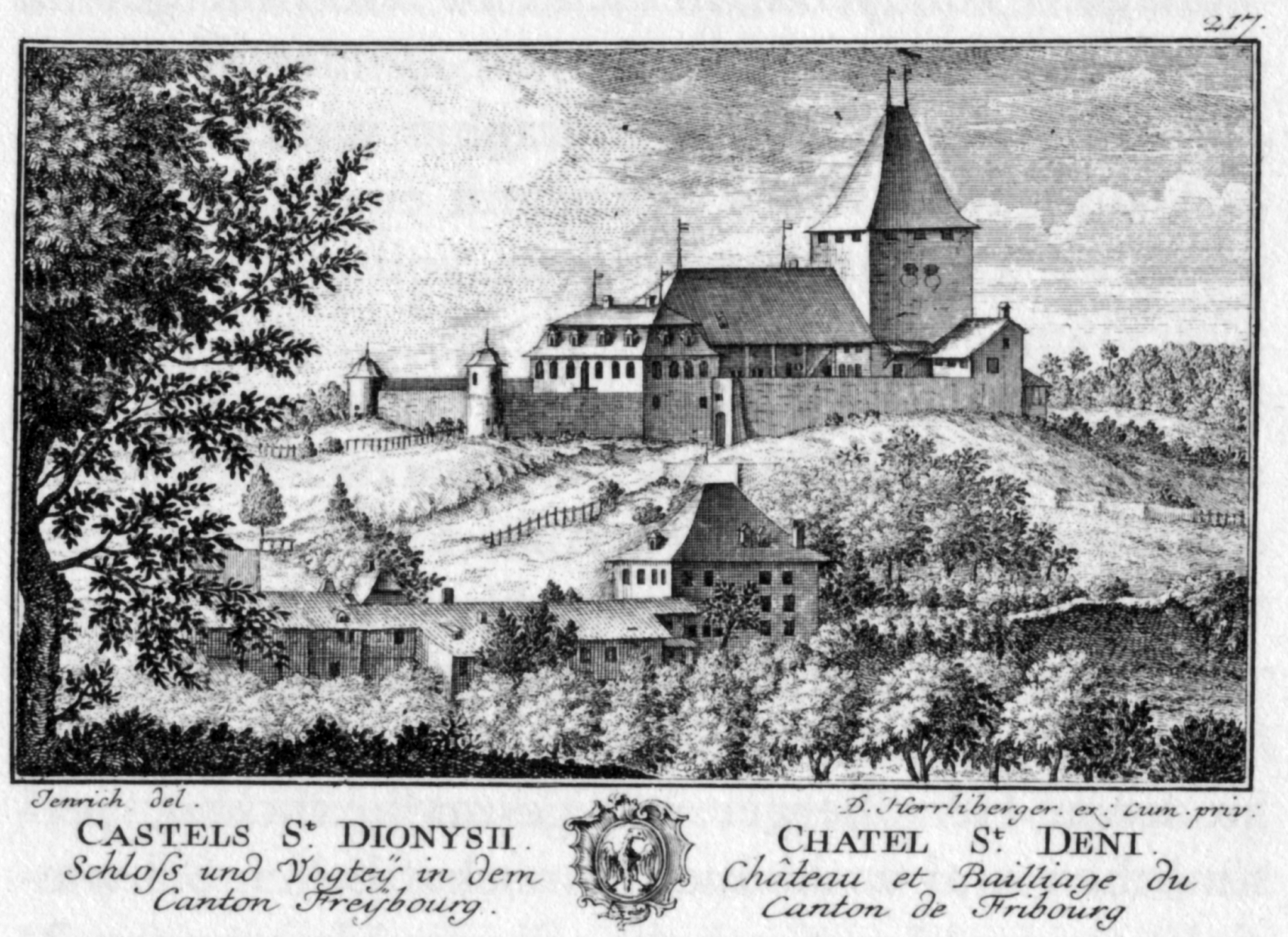 Schloss Châtel-Saint-Denis im Kanton Freiburg, ca. 1754. Blatt 217 der Topographie der Eidgenossenschaft. Kupferstich von David Herrliberger nach einer Zeichnung von Theodor Andreas Jendrich